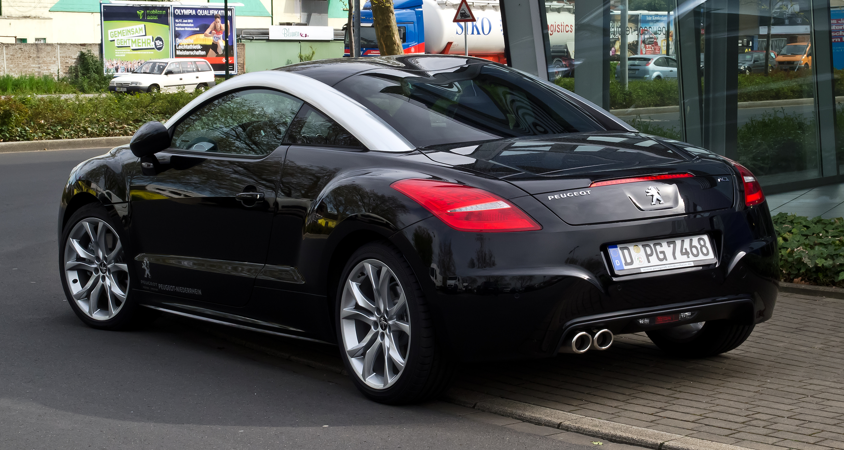 Peugeot RCZ HDi FAP 165